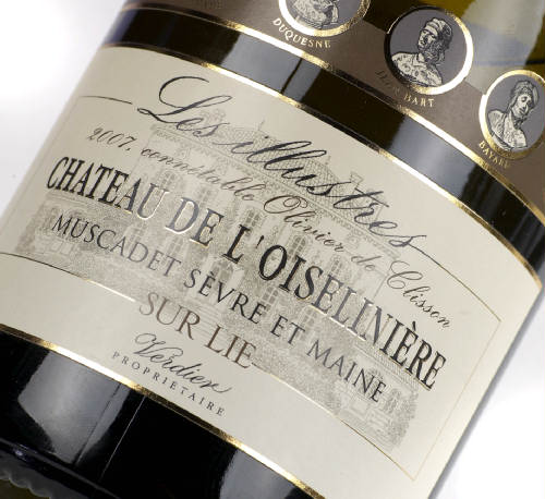 bouteille des vins de l'oiseliniere cuvee des illustres